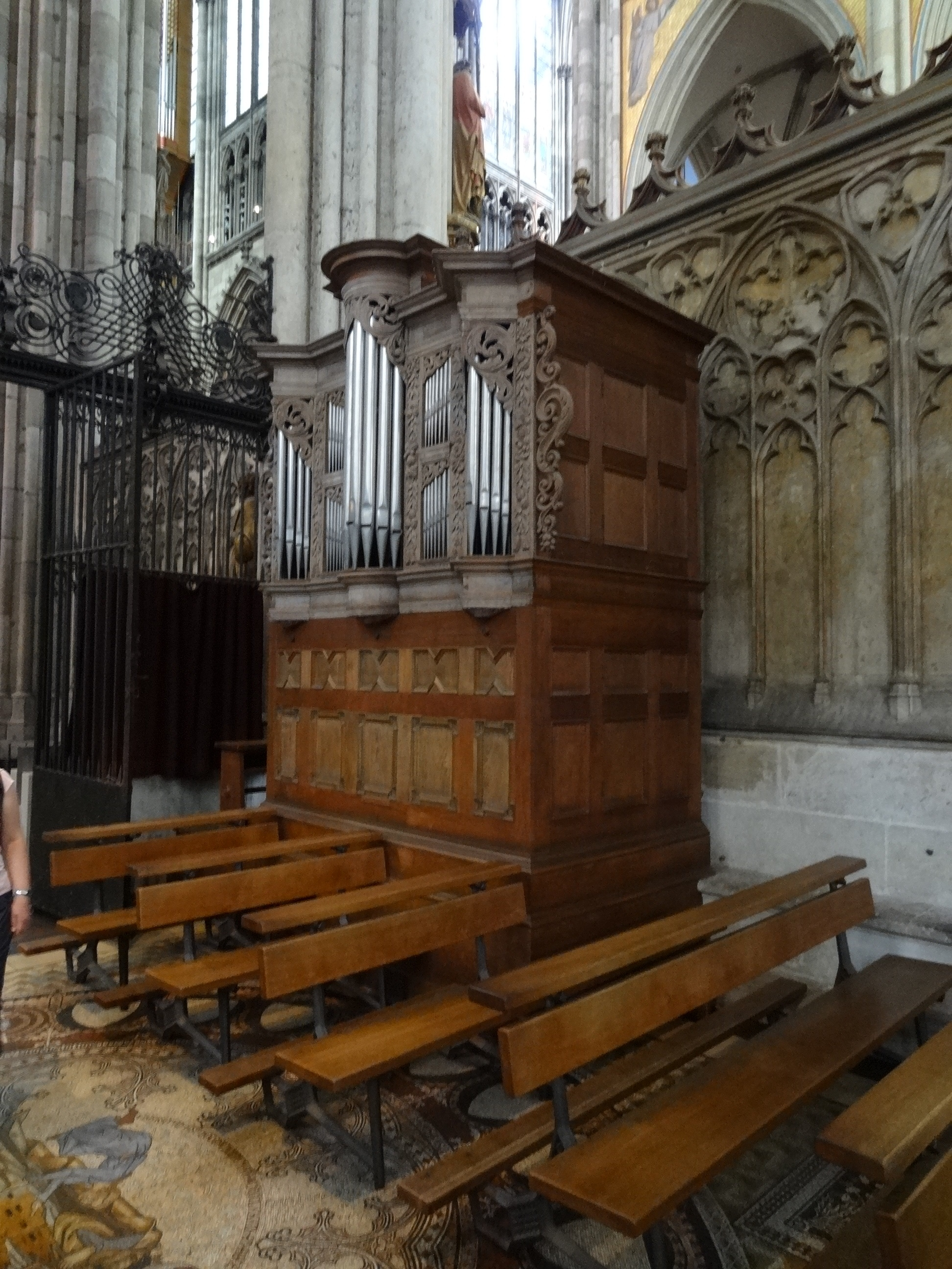 Organs in Cologne Cathedral